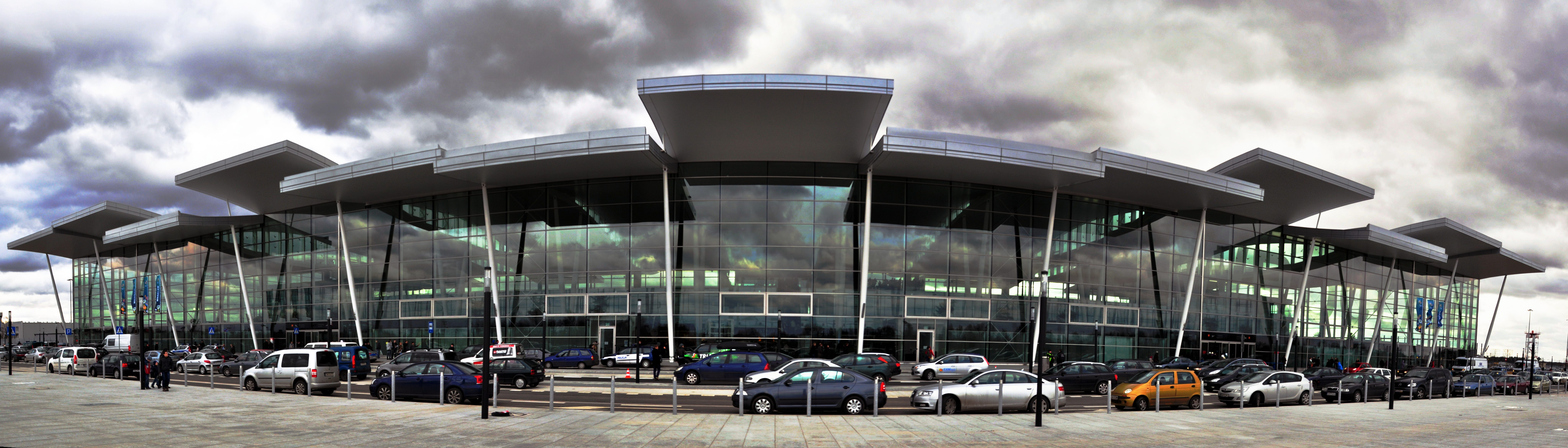 Terminal T2 lotniska we Wrocławiu